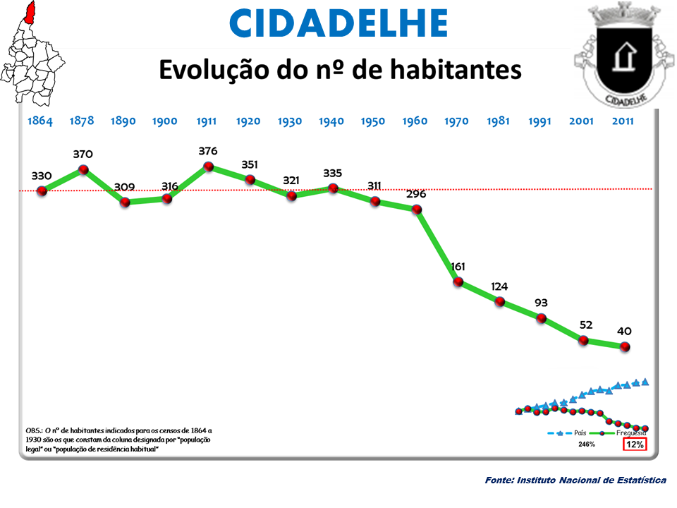 Censos 1864/2011